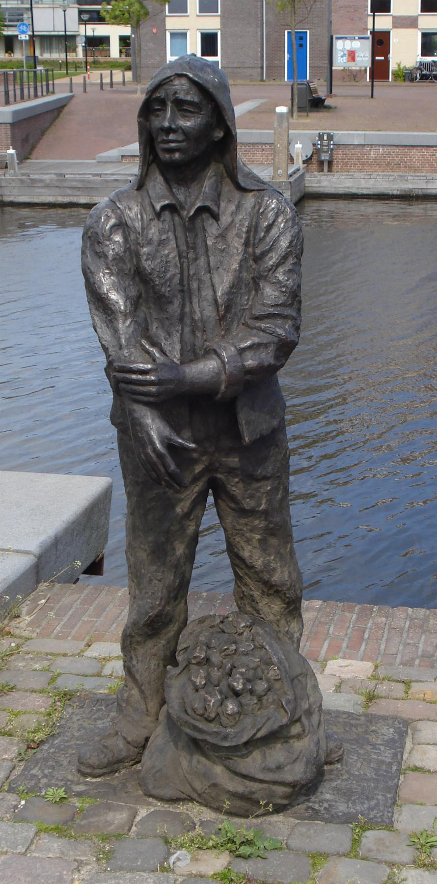 Amersfoort, Kleine Koppel. De Sassiaan (2004) van Marianne Houtkamp. Amersfoort/The Netherlands.